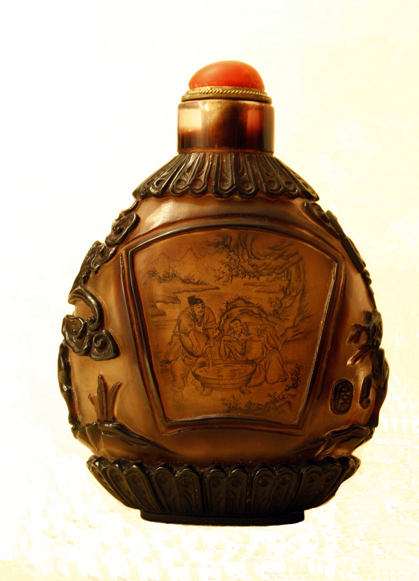 Tabaquera Xinesa. Vidre esculpit i pintat Té 11,9 mm. d’alçada. Museu de Miniatures de Besalú